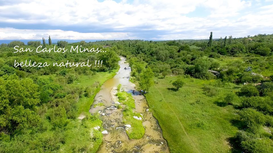 Arroyo Noguinet, San Caros Minas.